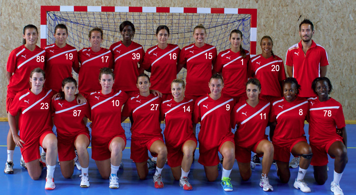 AS Cannes Handball D2F Effectif Saison 2012-13